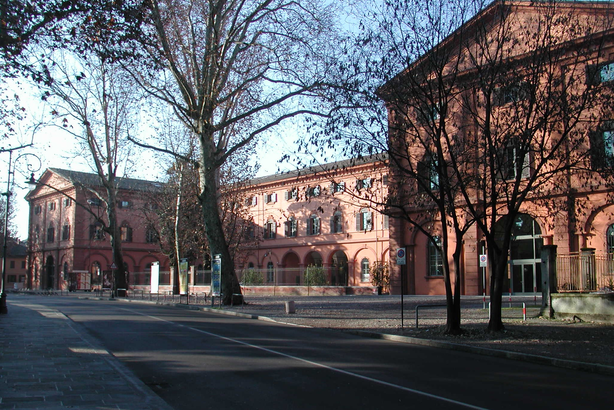 Reggio Emilia, Italy ex Foro boario (università) author: paolo da Reggio